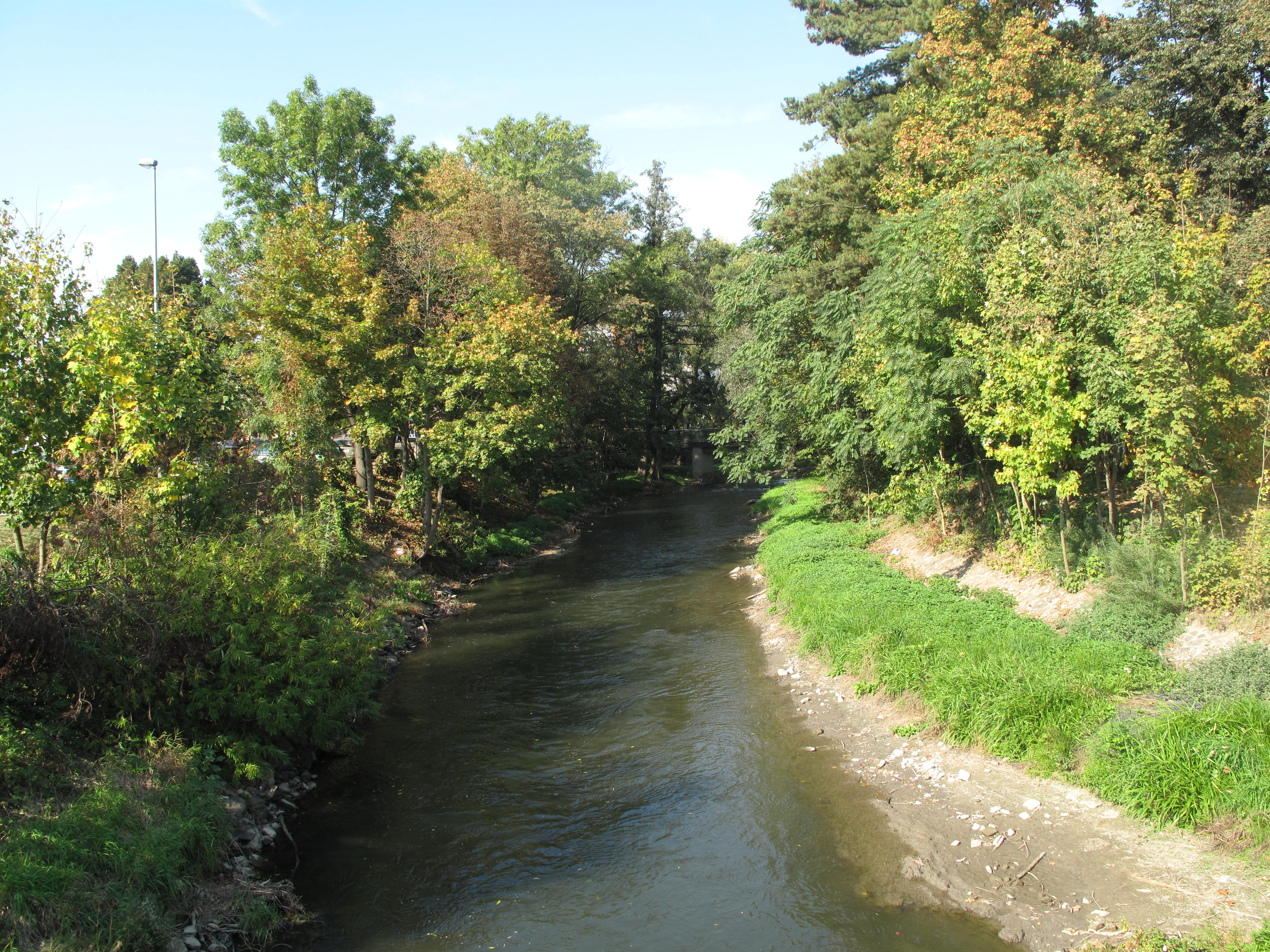 Česky: Olomouc